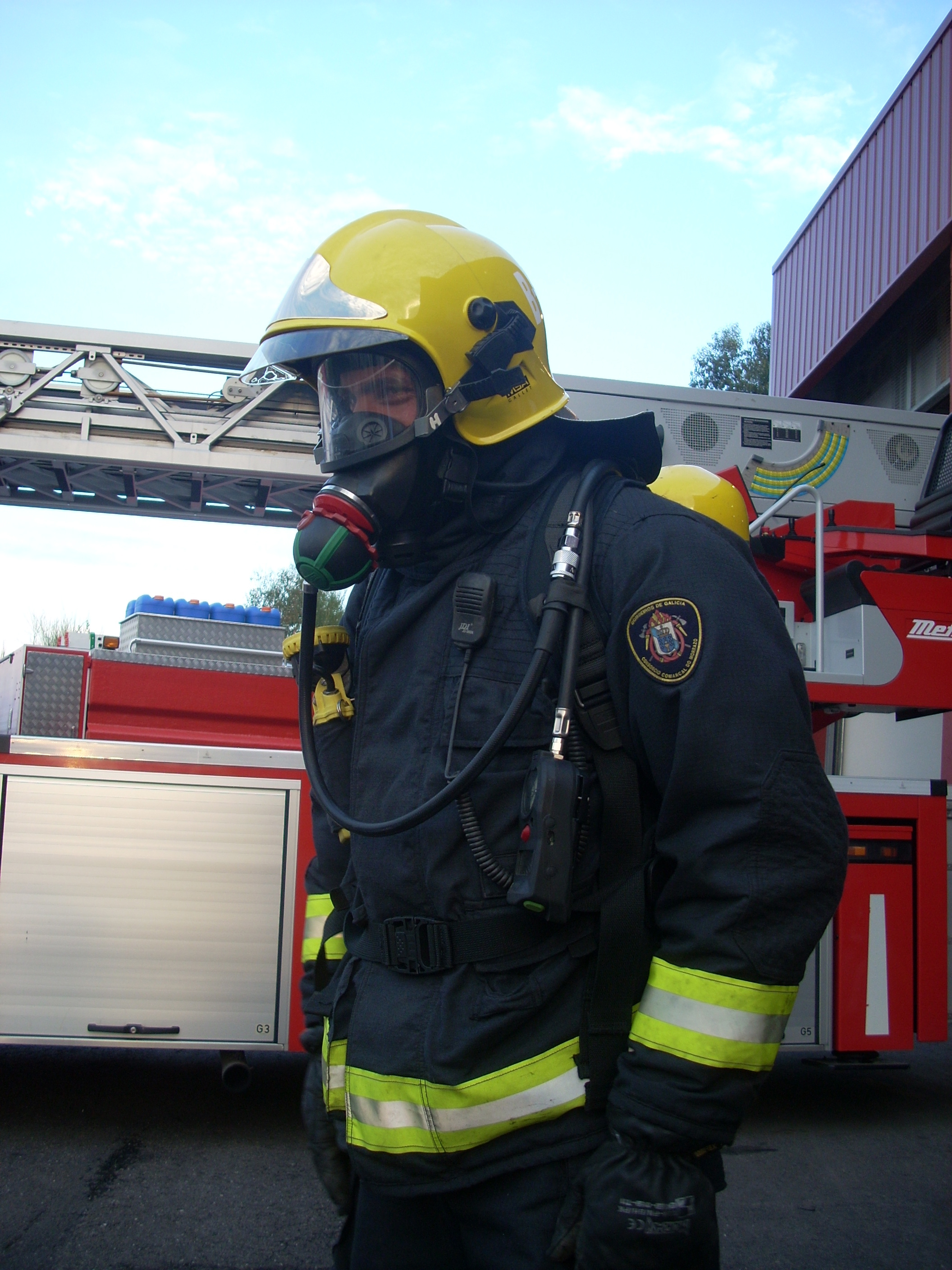 Bombeiro coa máscara de osíxeno